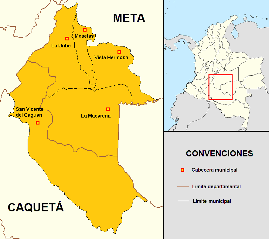 Mapa de la Zona de Distensión del Caguán (1998-2002)